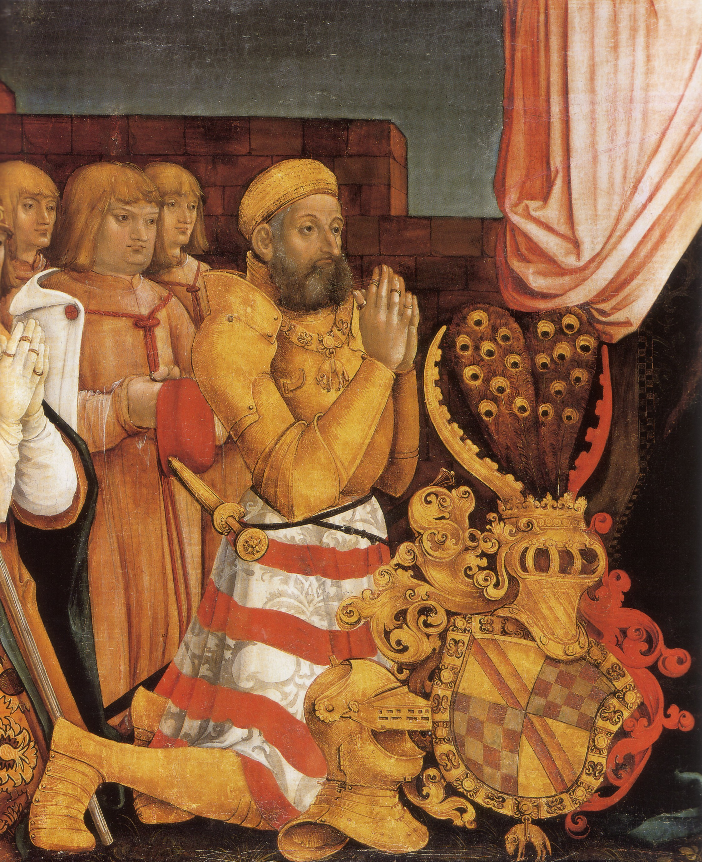 Ausschnitt aus der Votivtafel von Hans Baldung genannt Grie